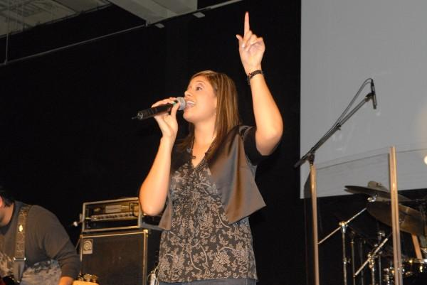 Marcela Gandara en concierto 2012.